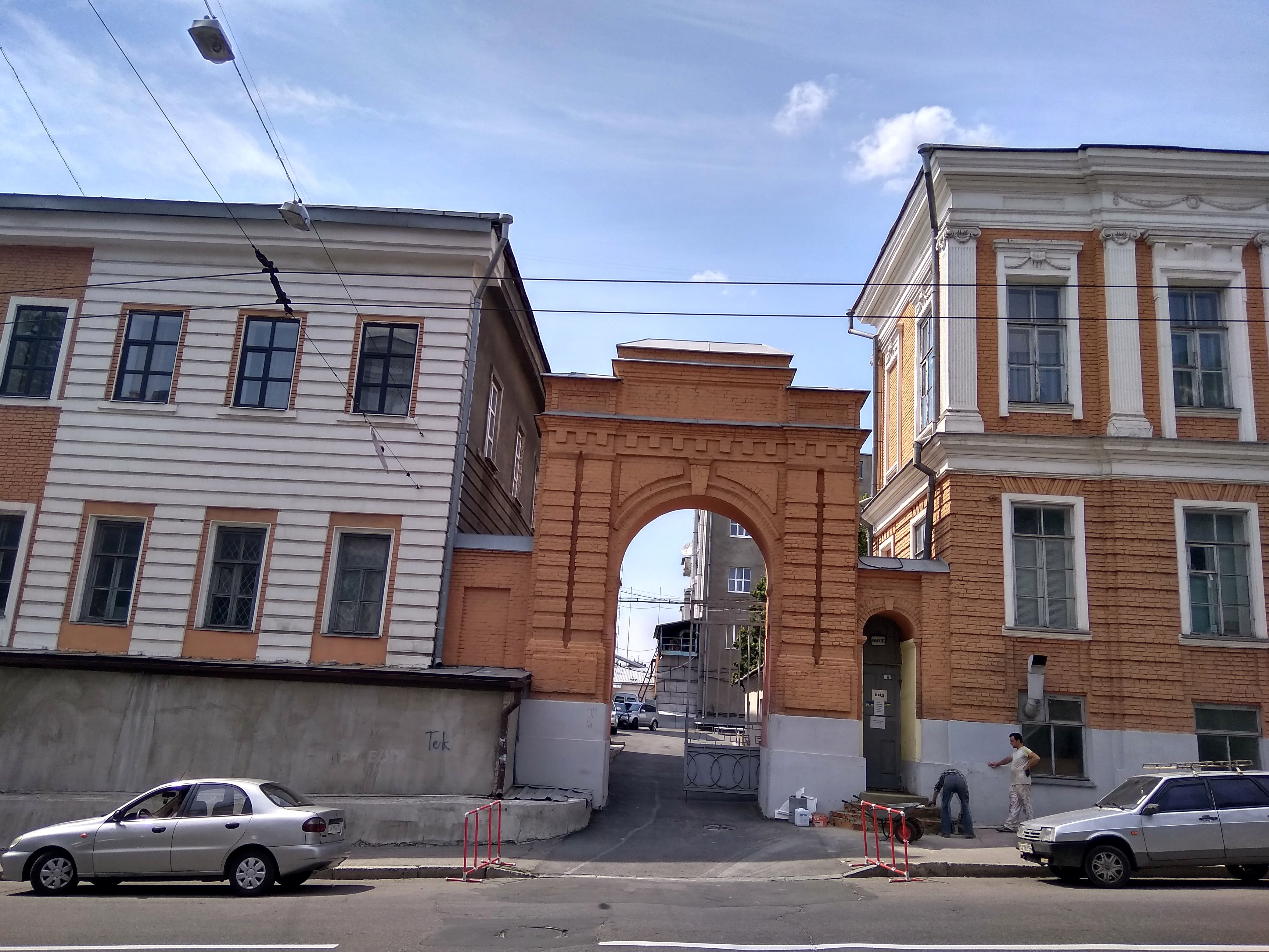 Брама (мур.), Харків, вул. Університетська, 12/14, 14/16